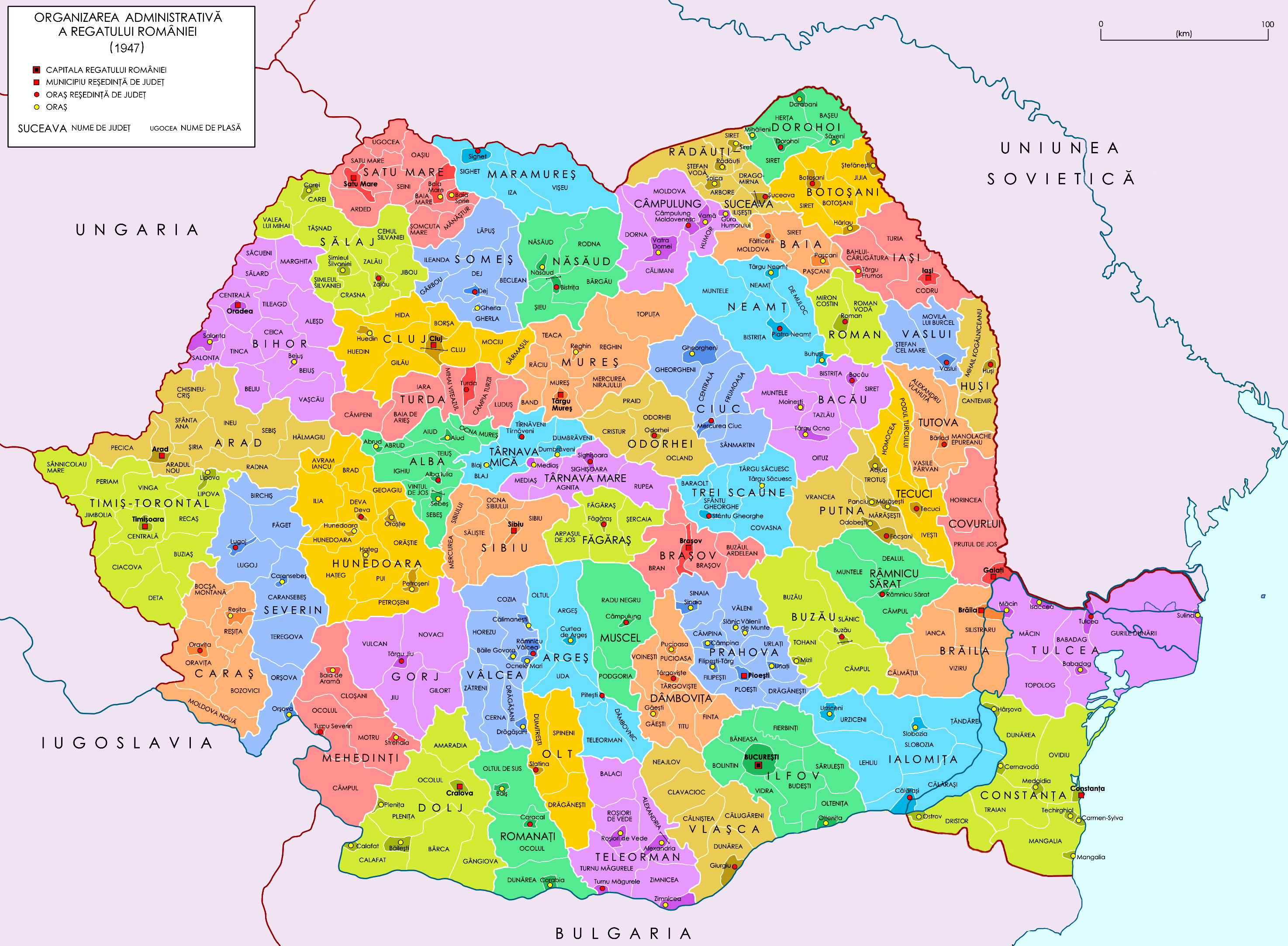 Harta administrativă a României, 1947